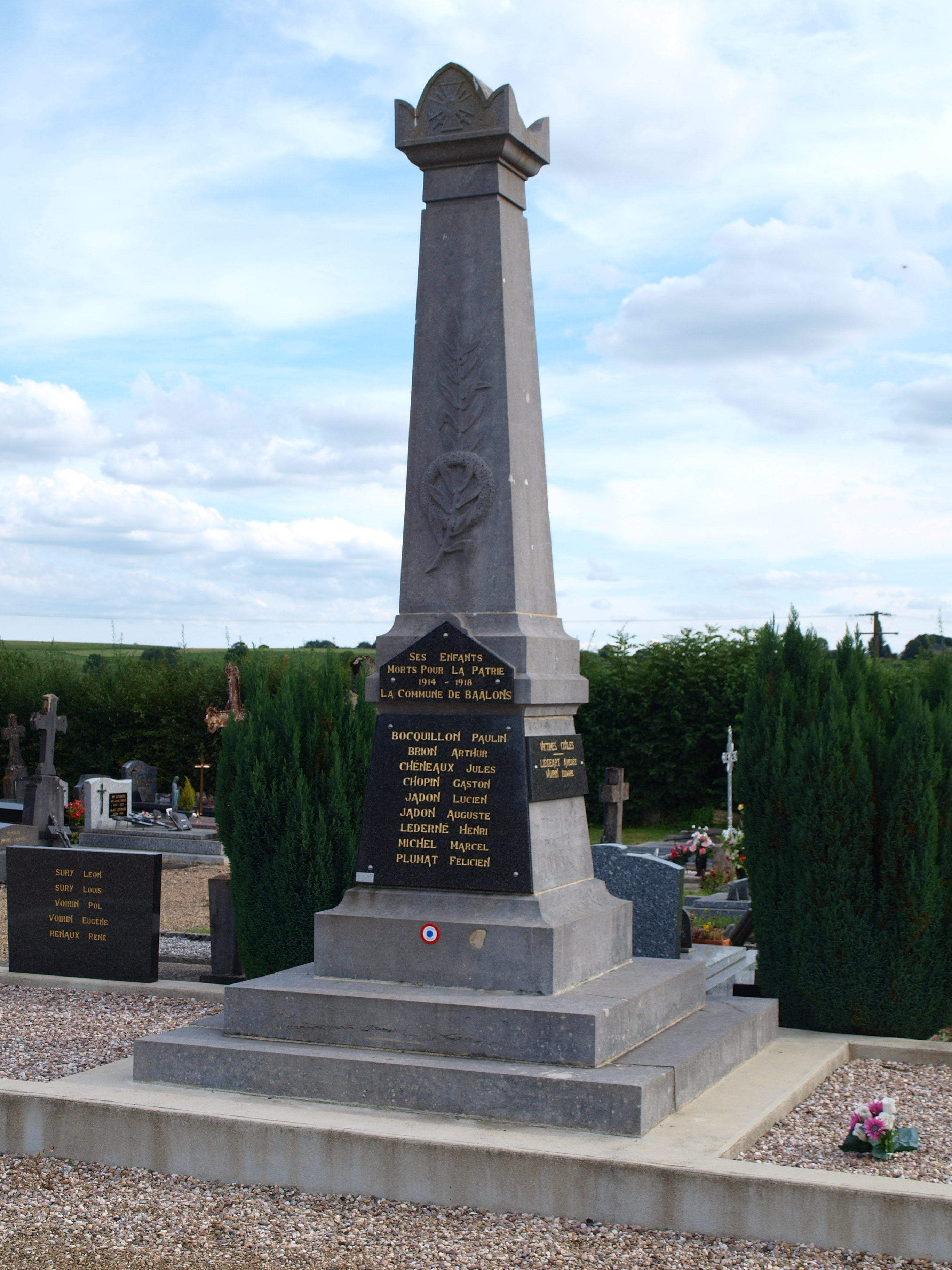 Baâlons (Ardennes, France) ; monument aux morts.